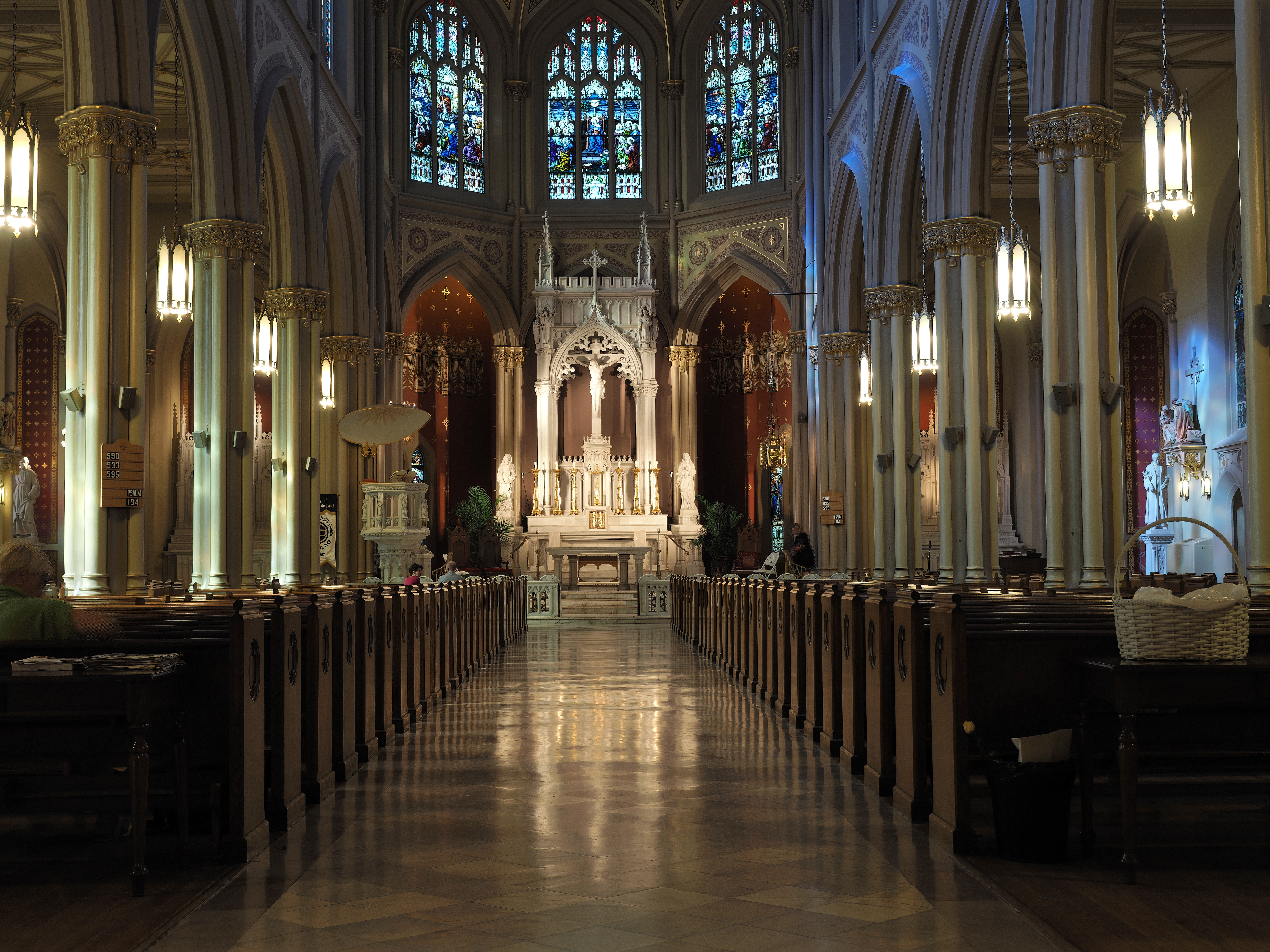 New Orleans (La, USA) Loyola Universität, Holy Name of Jesus Church Mittelschiff